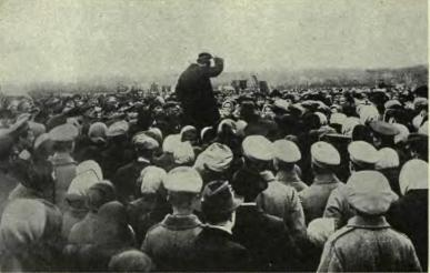 Trotsky durante un discurso en Petrogrado.